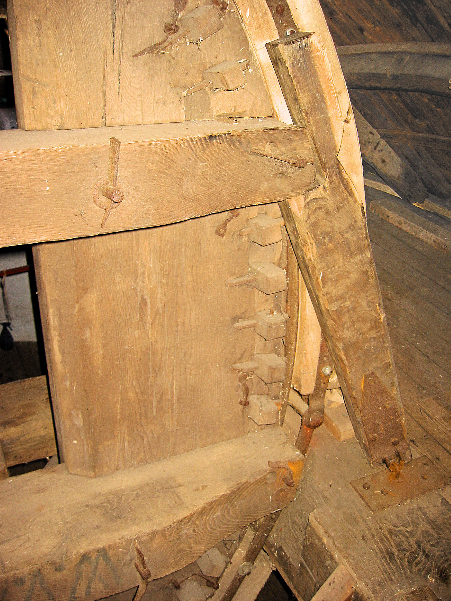 Bovenwielstut van de molen De Zwaan, Lienden, Gelderland, the Netherlands